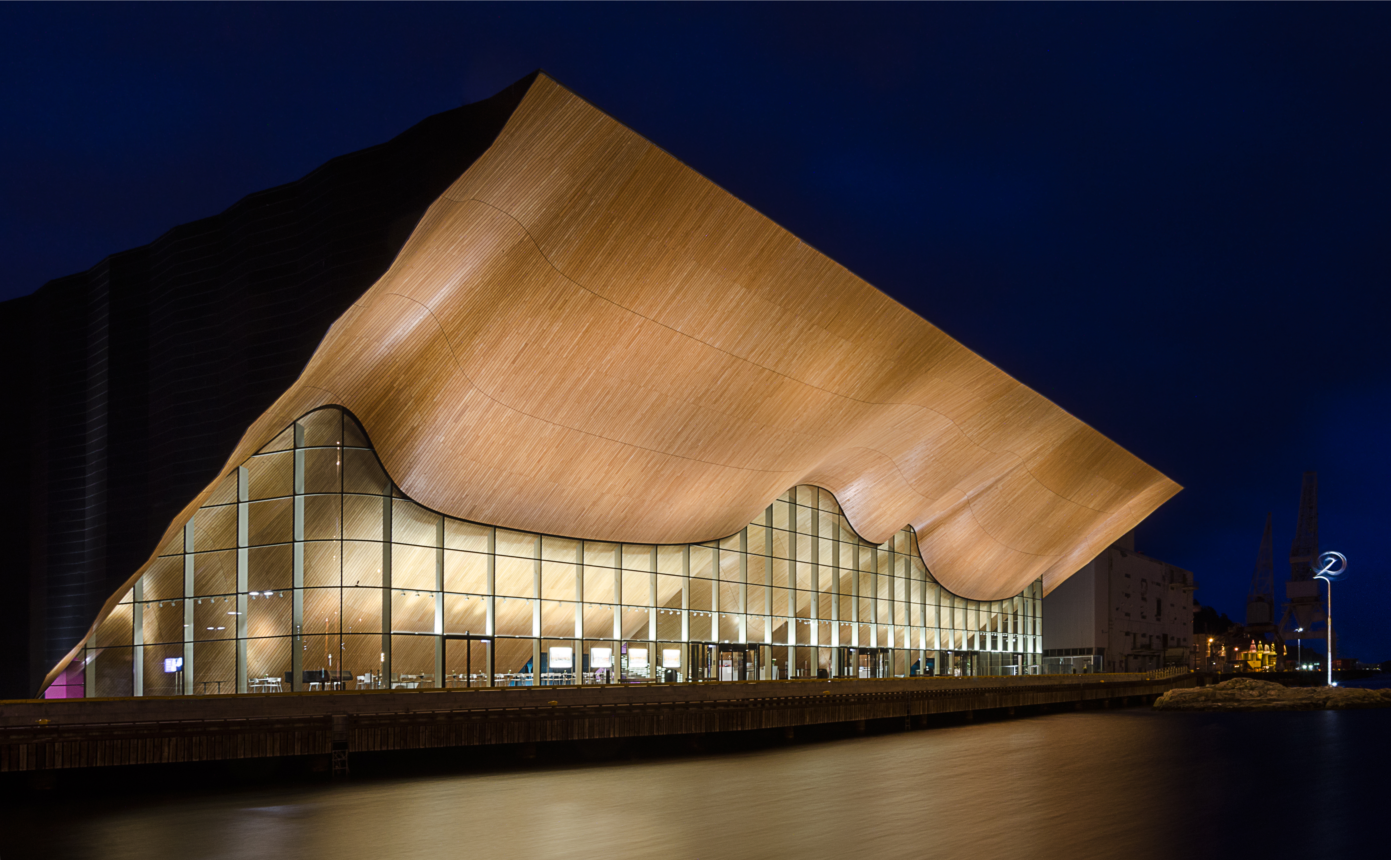 Kilden teater og konserthus i Kristiansand fotografert i den blå timen